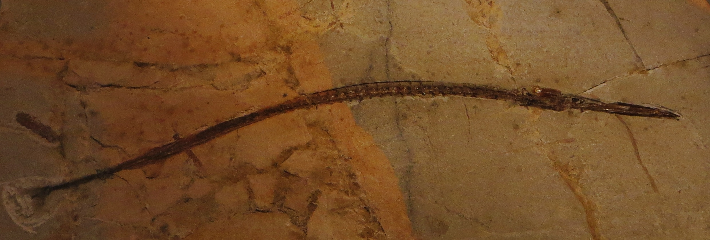 Fossil of Fistularioides- Museo dei Fossili di Bolca